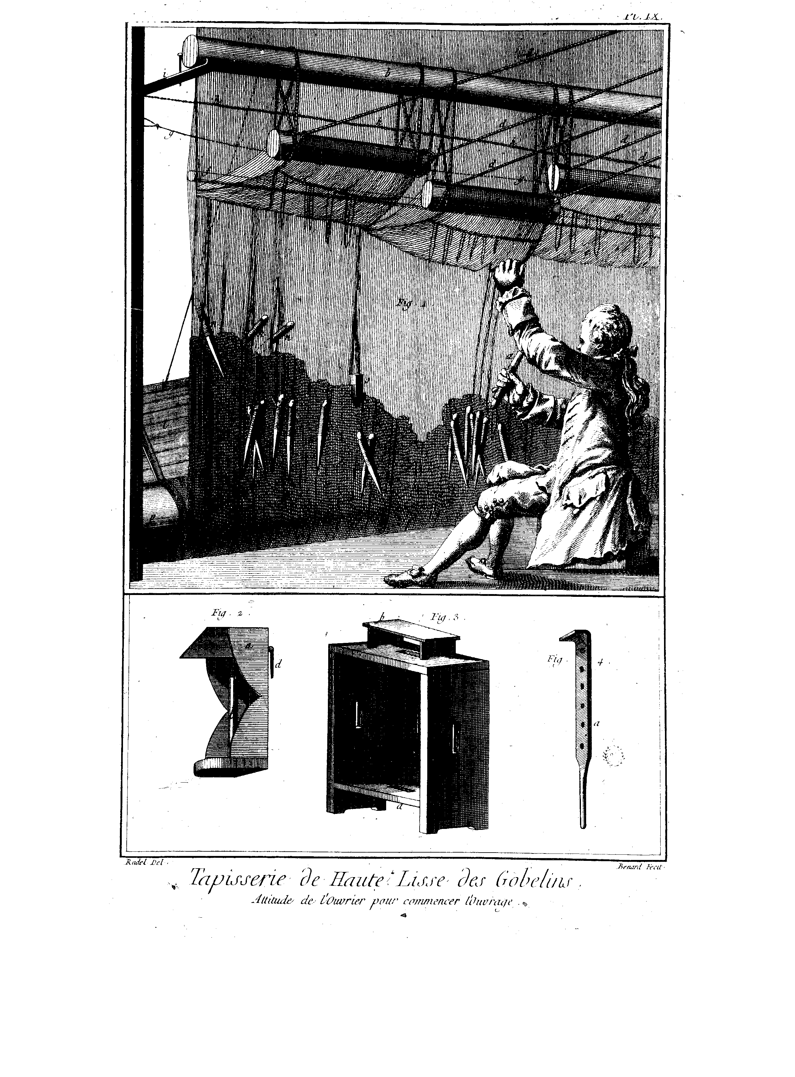 Planches de l'Encyclopédie de Diderot et d'Alembert, volume 8